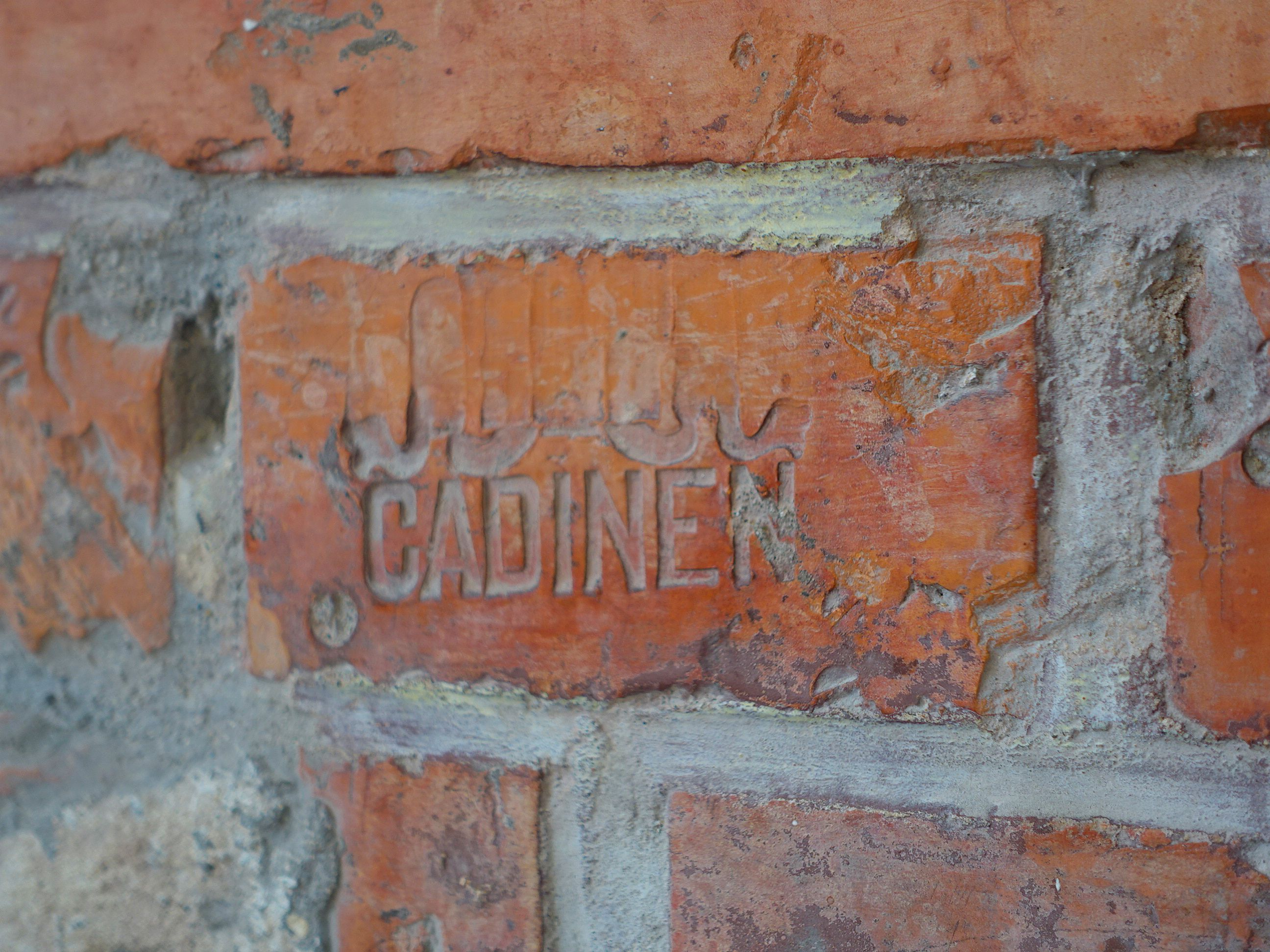 Einer von vielen Ziegelstempeln in Cadinen